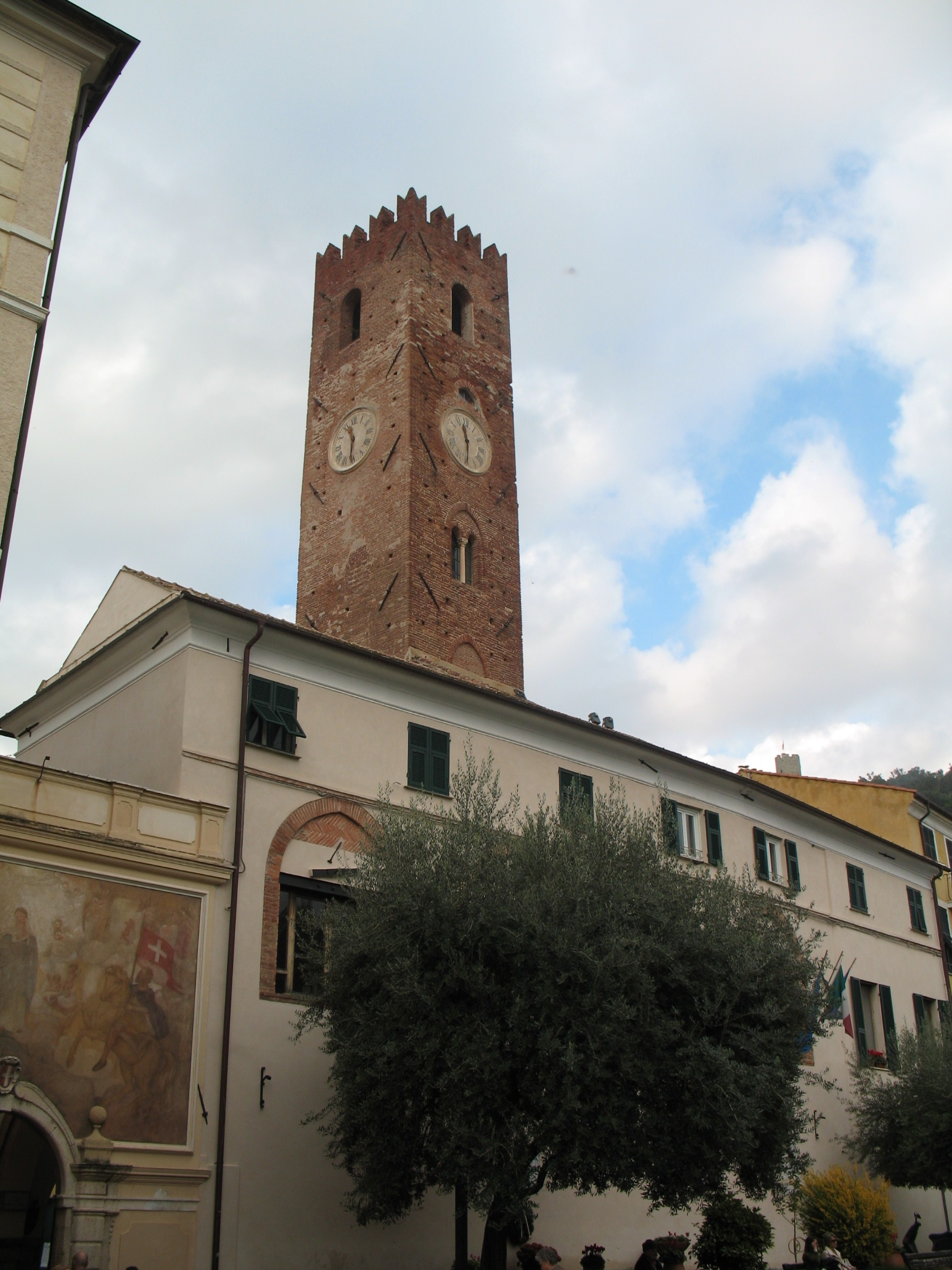 Serie di Immagini da Noli in provincia di Savona